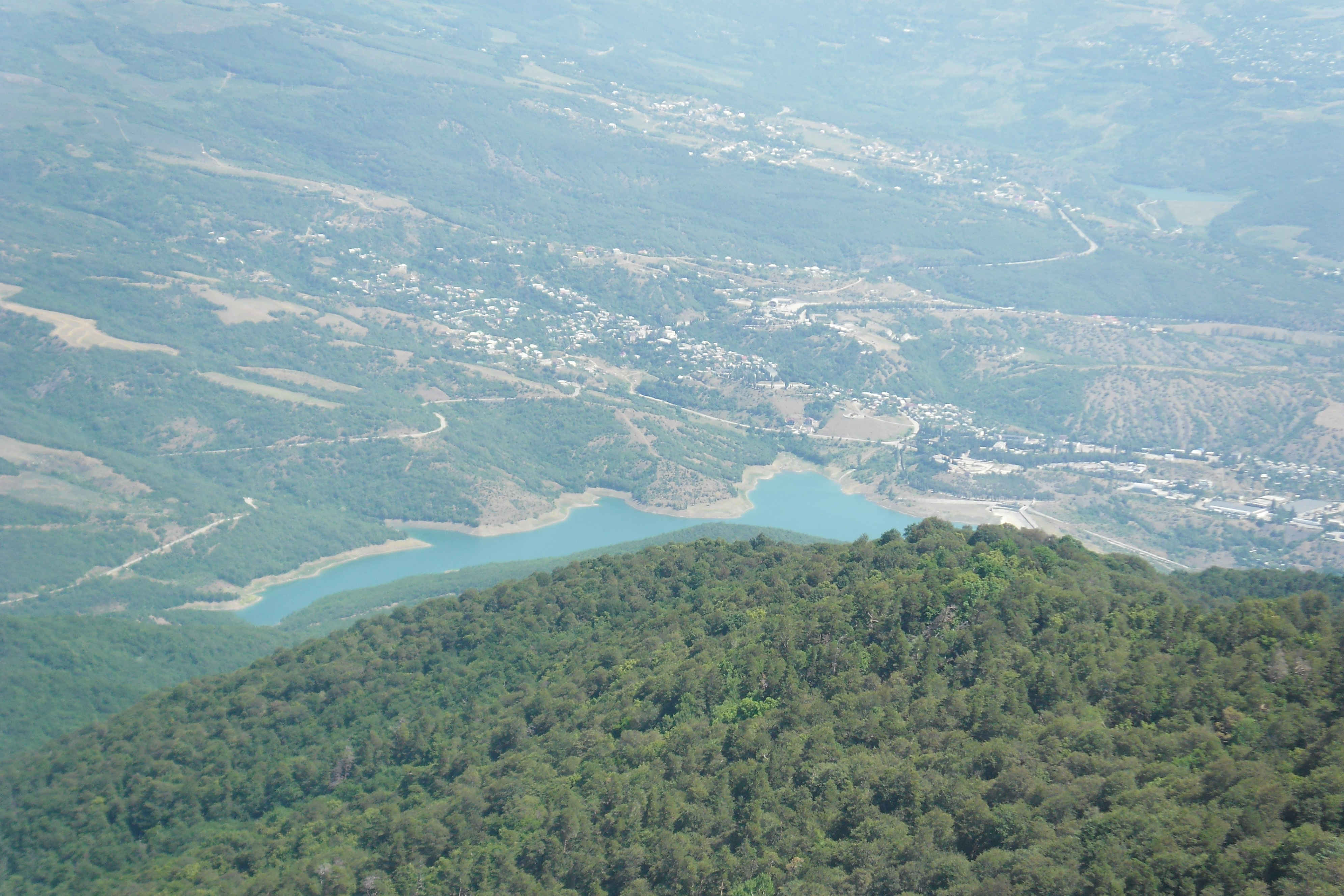 Ізобільницьке_водосховище: Фото